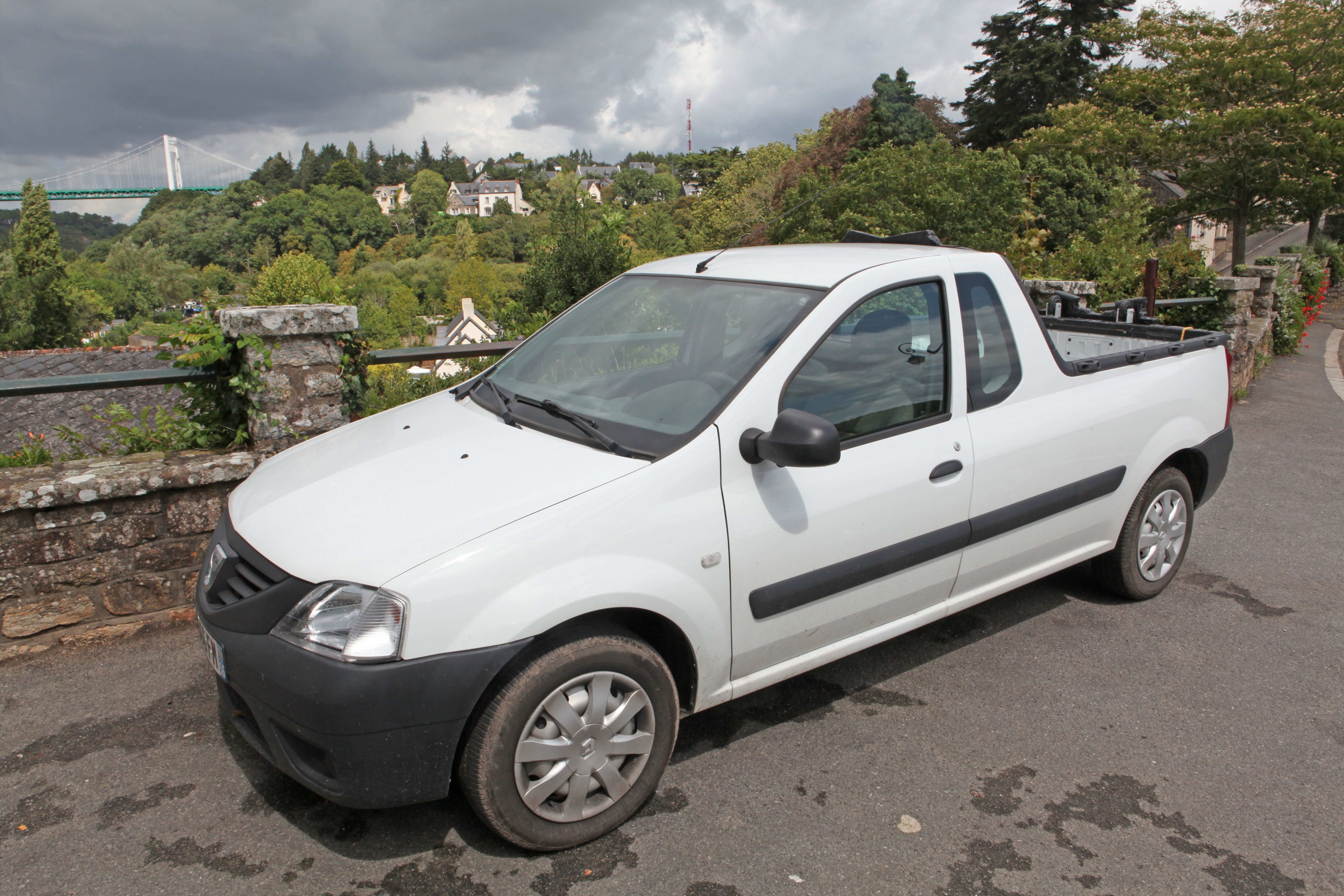 Dacia Logan 1,5 DCI Pickup